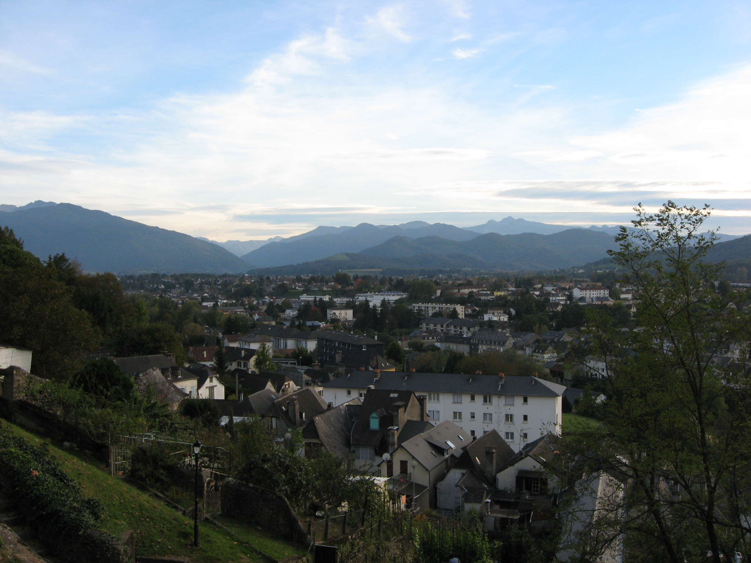 Vue du quartier Oloron-Sainte-Marie depuis le quartier Sainte-Croix (Pyrénées Atlantiques) Pyrénées).